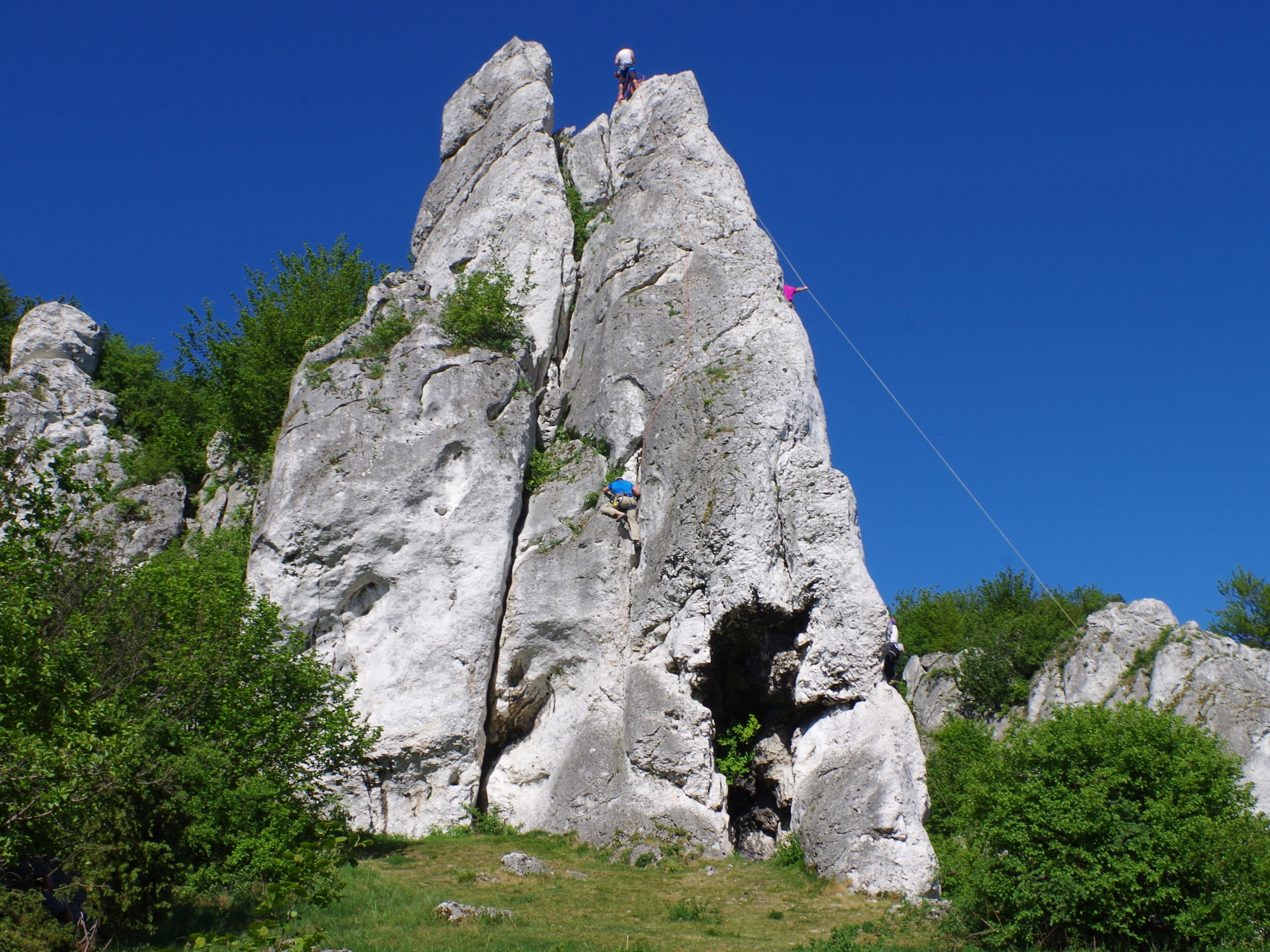 Skały Rzędkowickie. Wielka Baszta